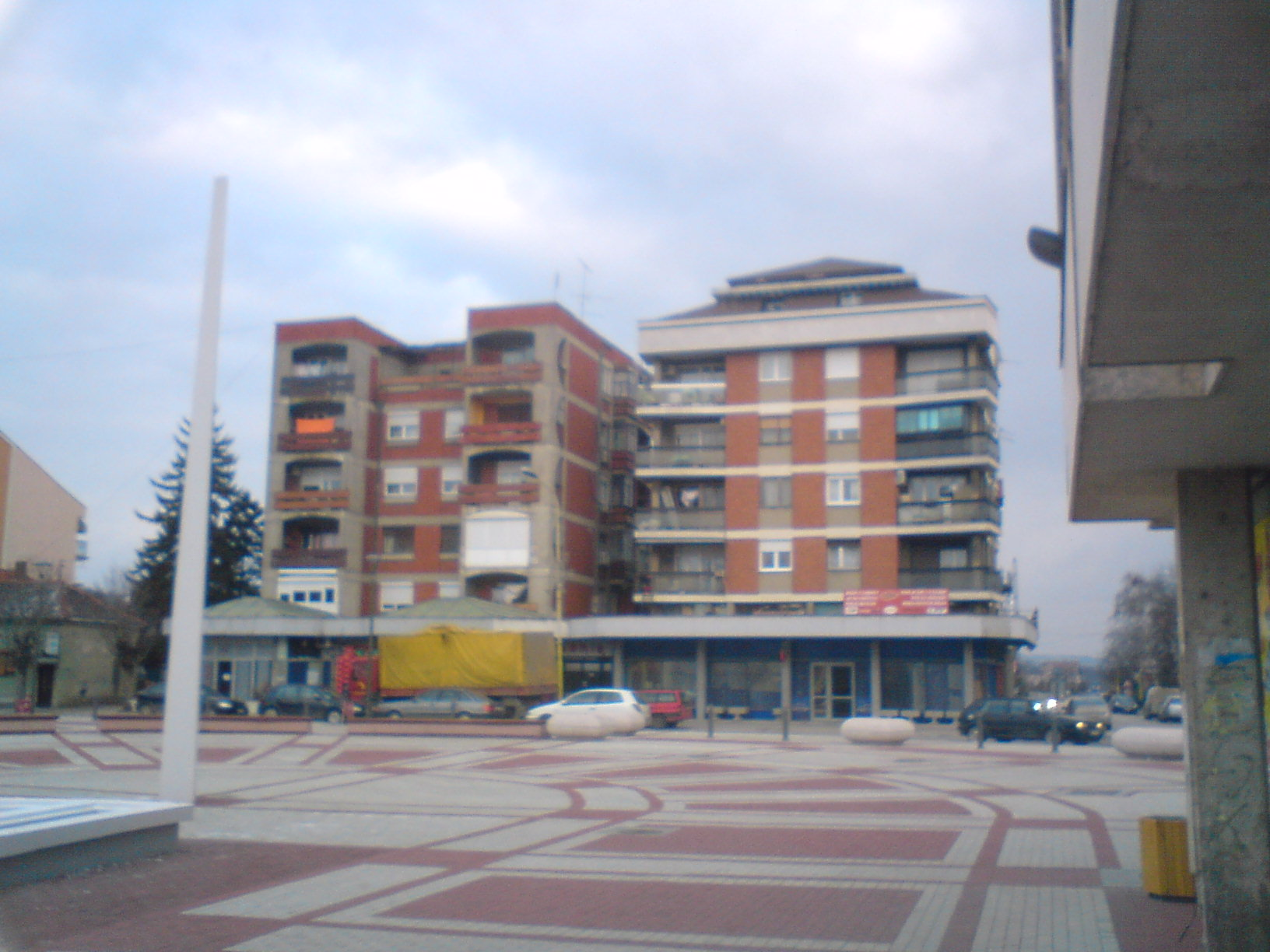 Stambeni objekti u Batočini.